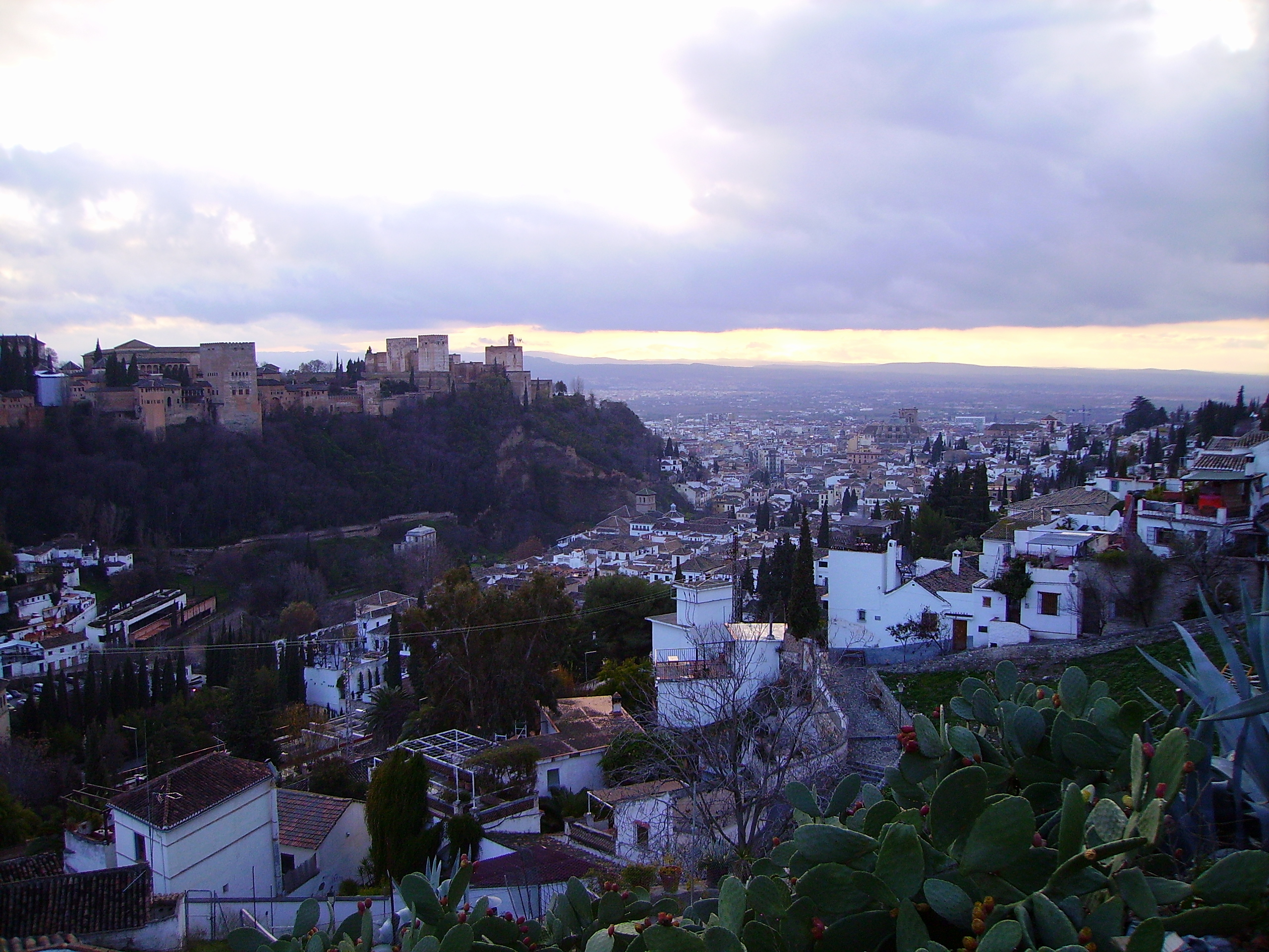 Alhambra y Albaicin